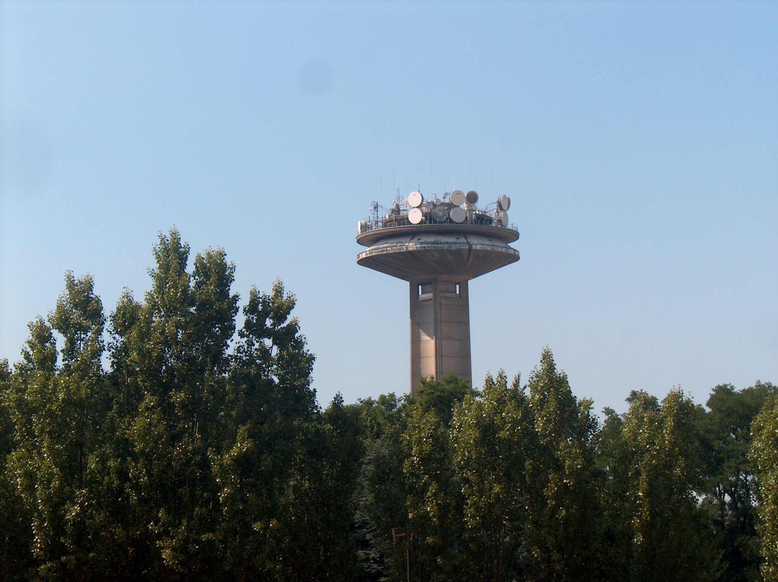 La tour Reyers vue depuis la rue Knapen à Schaerbeek, Bruxelles, Belgique.